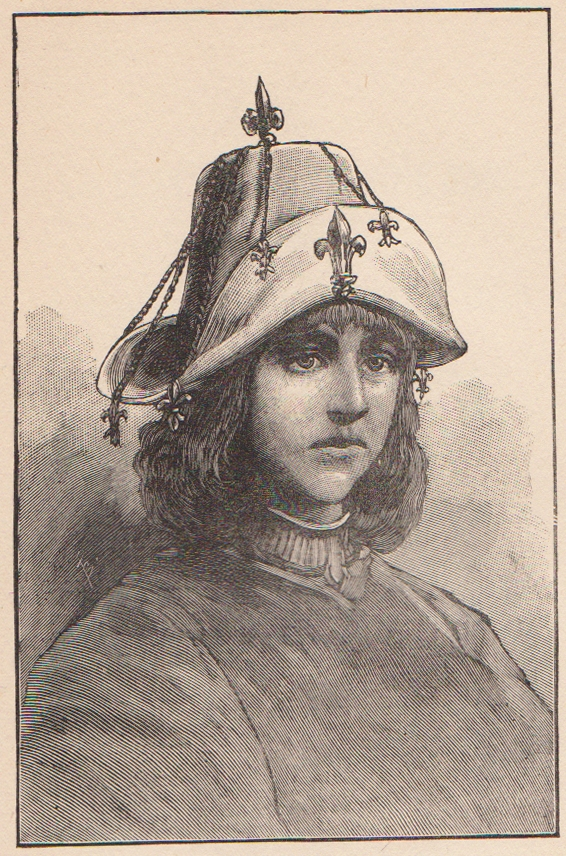 Gravure représentant le chapeau deJeanne d'arc d'après une description d'époque. Disparu en 1792. Gravure ancienne, auteur et graveur non précisé.